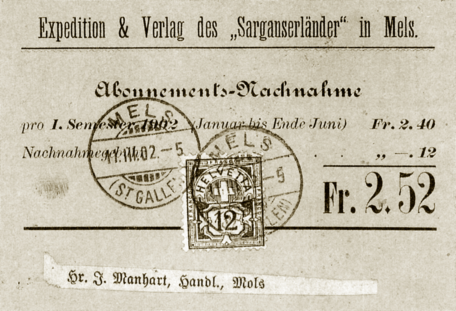 Abonemment des Sarganserländers